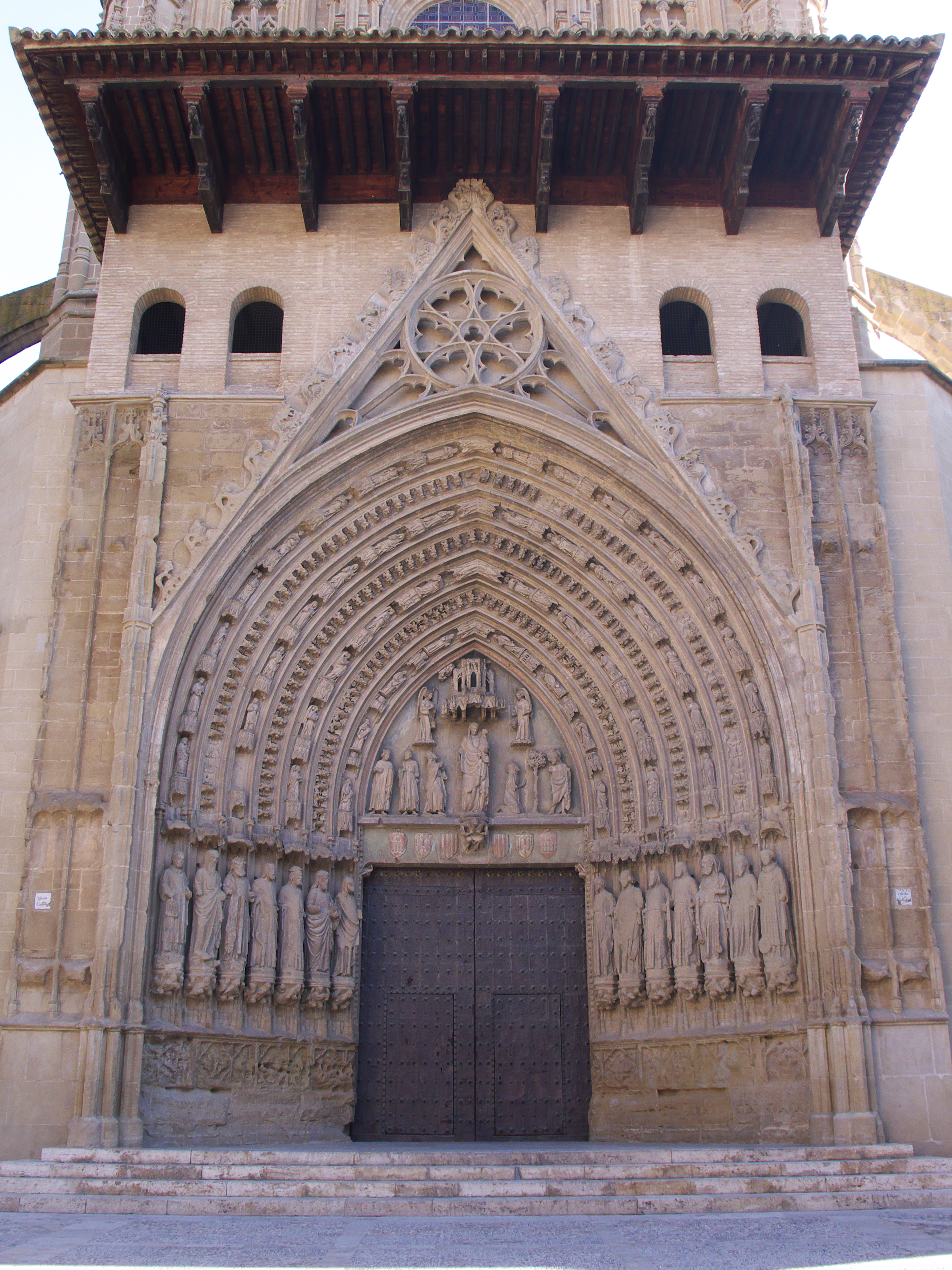 Promovida por el obispo Martín López de Azlor, cuyo escudo figura en el dintel.